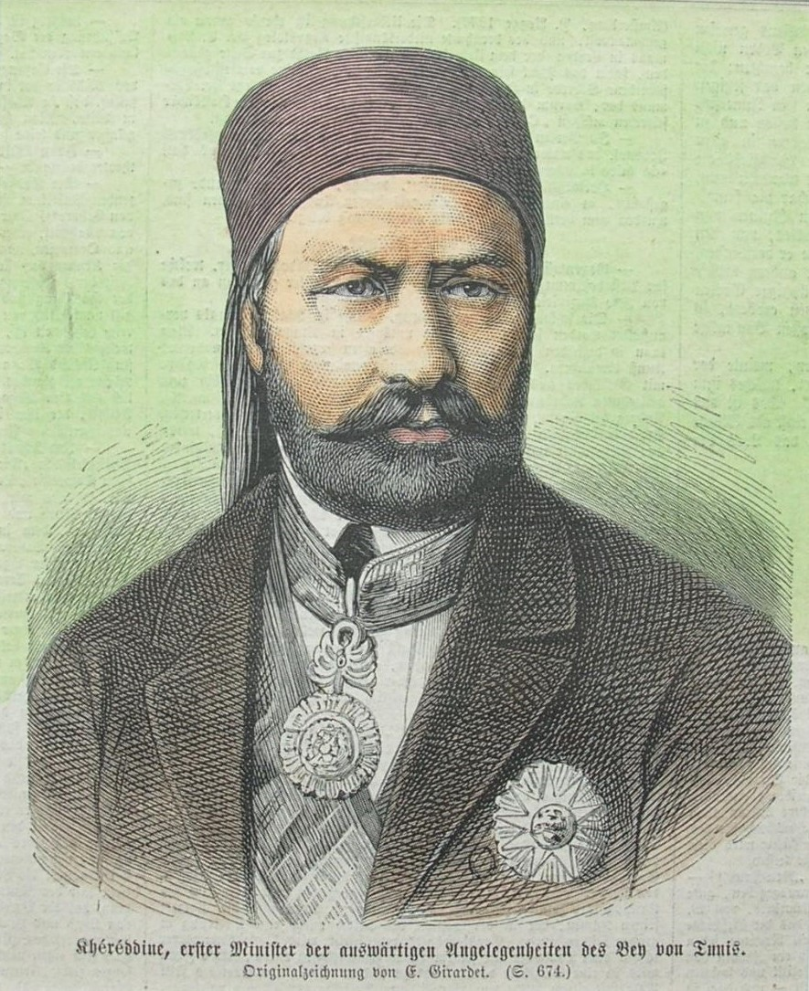 Khèrèddine, erster Minister der auswärtigen Angelegenheiten des Bey von Tunis 1877, teilkolorierter Holzstich, ca. 14 x 12 cm